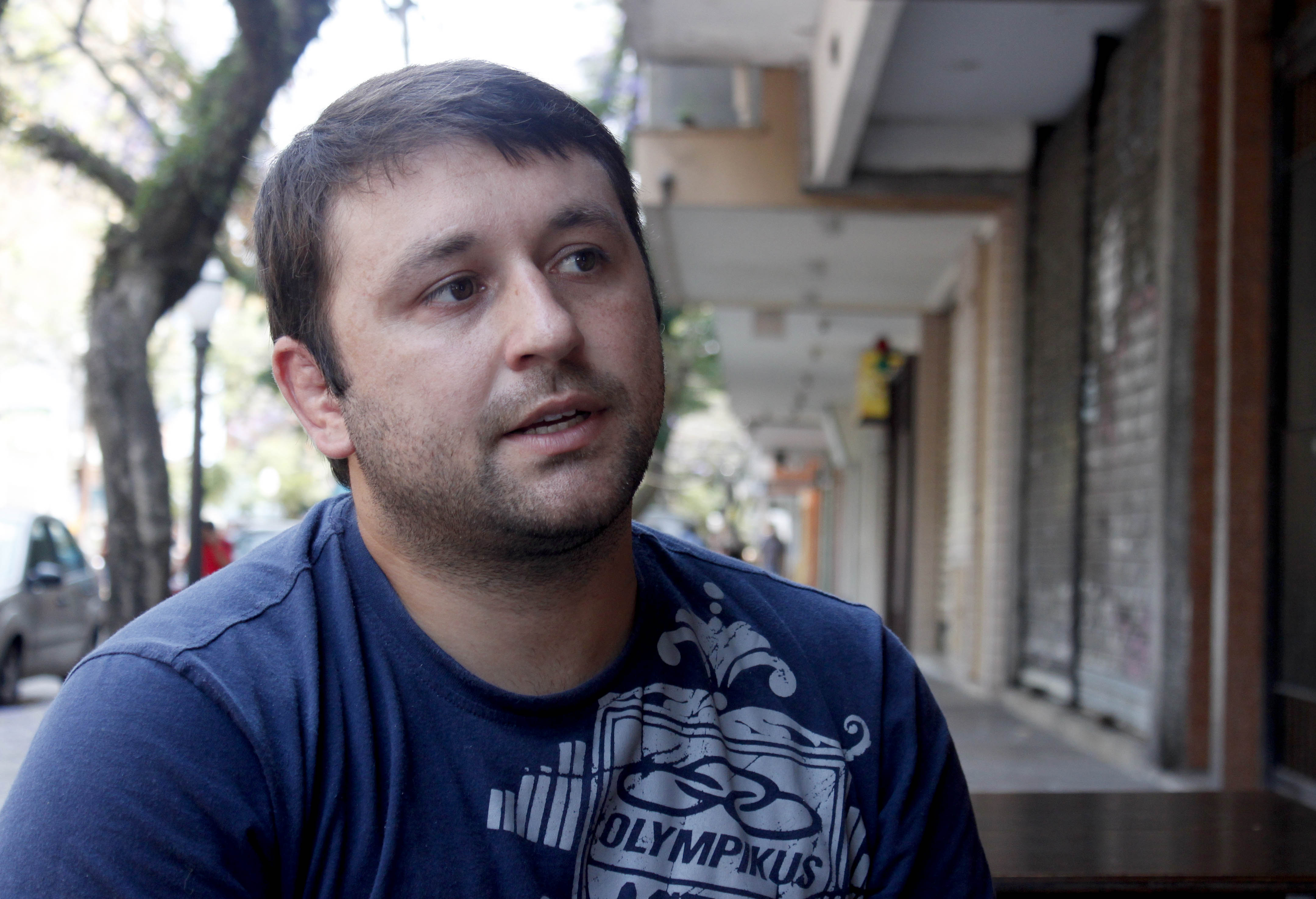 Derly acredita que o incentivo à prática do exercício físico é uma maneira eficiente de diminuir os atendimentos na área da saúde. Foto por: Gabriela Cavalheiro